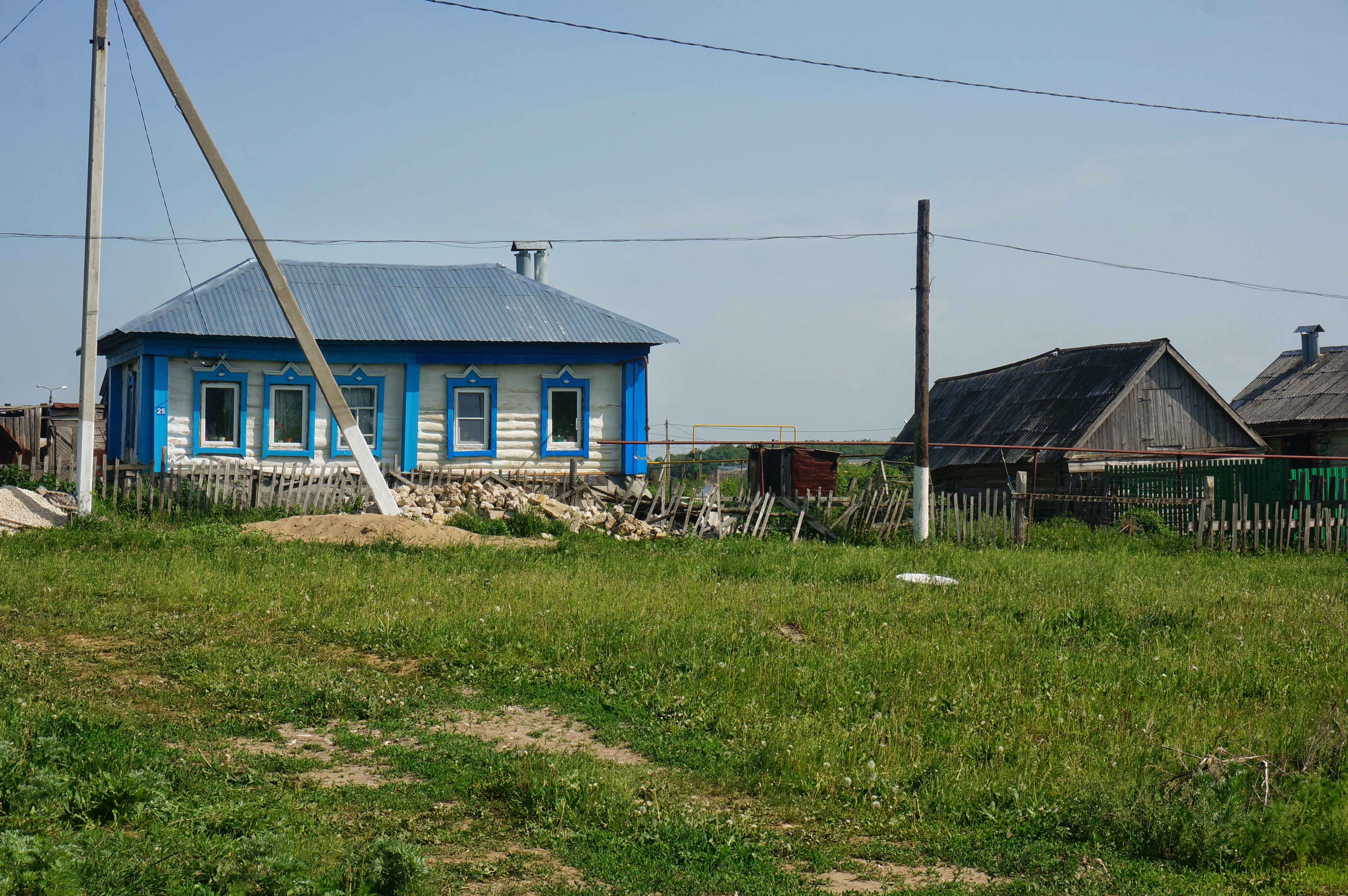 Жилой дом в селе Бахилово